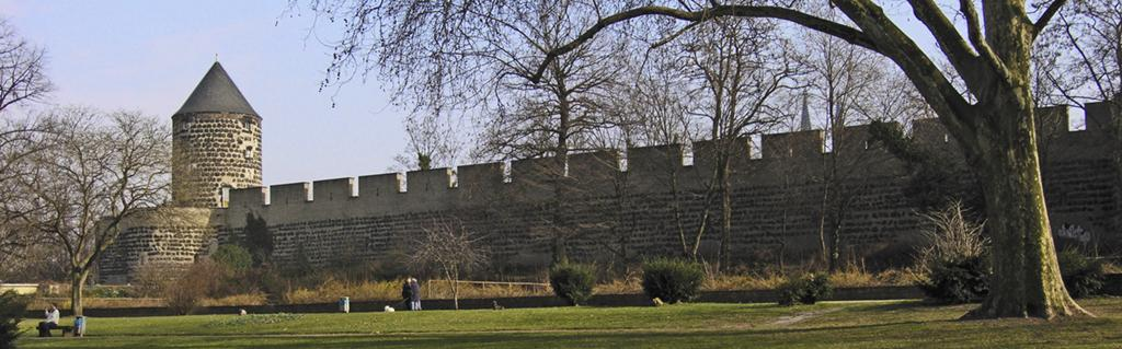 Köln: Stadtmauer am Hansaring und Gereonsmühlturm